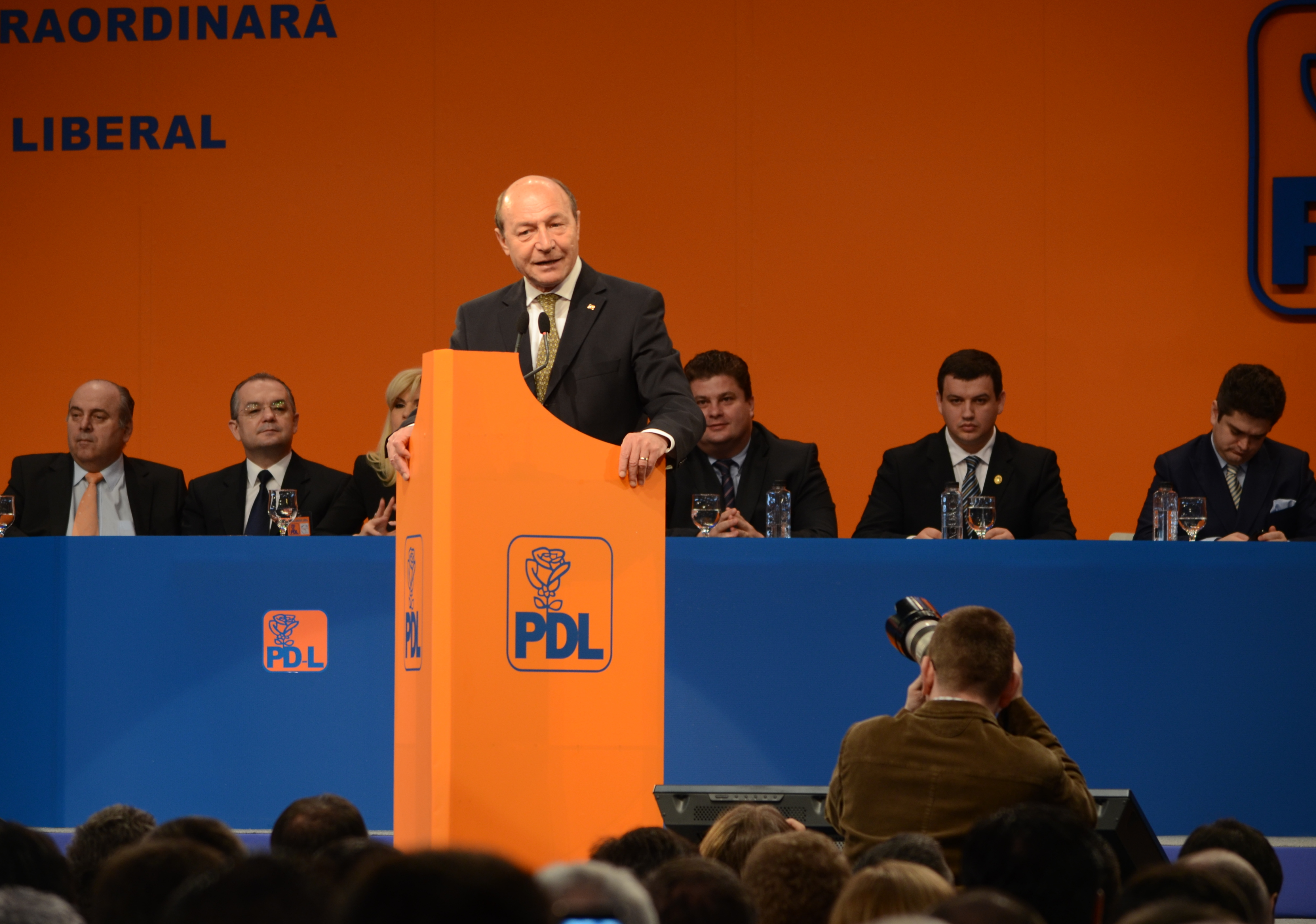 Traian Băsescu, la Convenția națională extraordinară a Partidului Democrat-Liberal, 23 martie 2013 În planul secund: Gheorghe Ștefan, Emil Boc, Elena Udrea, Florin Popescu, ?, Teodor Paleologu